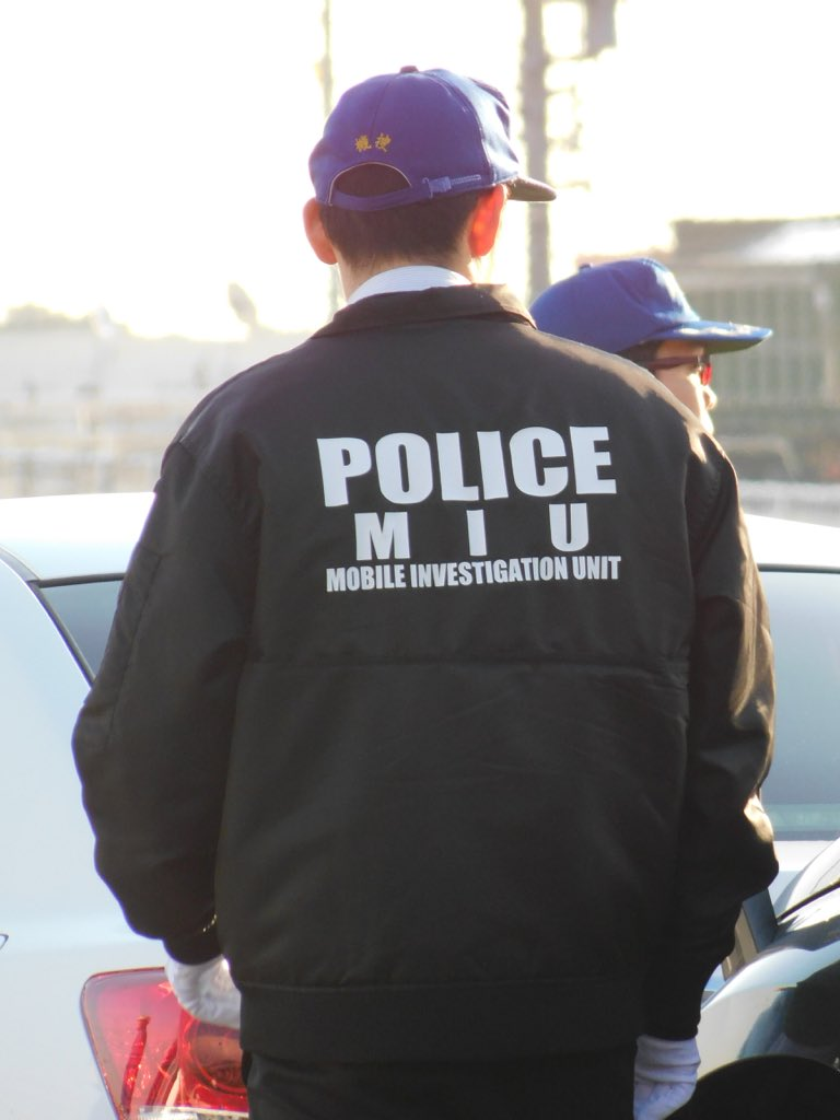 愛知県警察年頭視閲式にて、機動捜査隊。